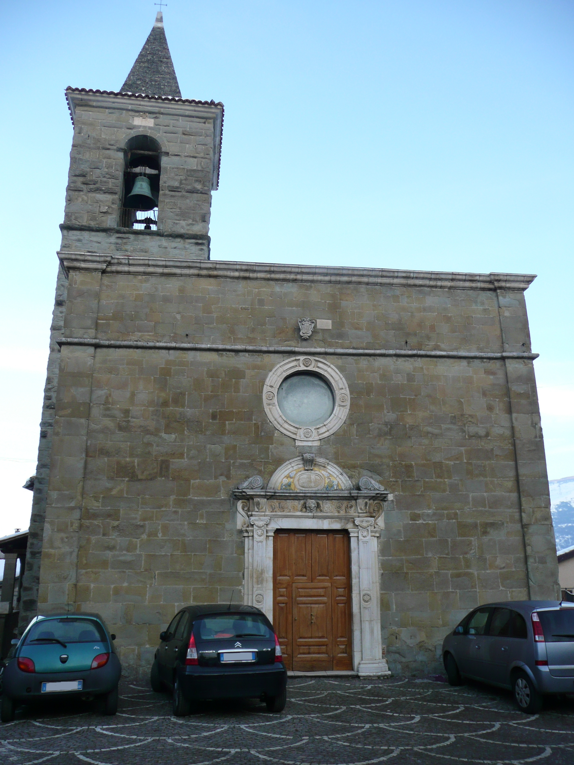 Chiesa dei Santi Pietro e Paolo - Fano Adriano - Teramo